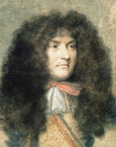 Probablement réalisé comme prototype, en vue de la tenture de "L'Histoire du Roy"